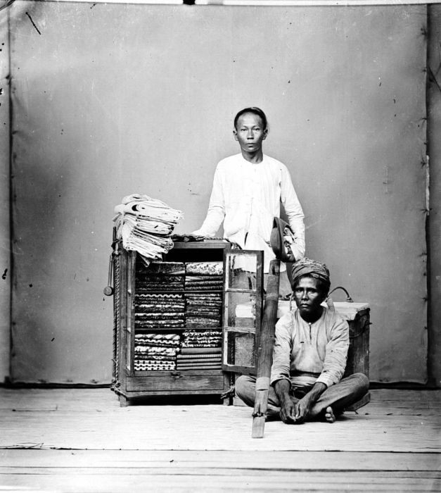 Negatief. Chinese verkopers (klontong) te Semarang, Java